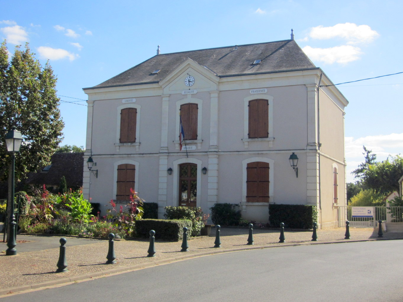 Mairie de Dun-le-Poëlier, Indre, France